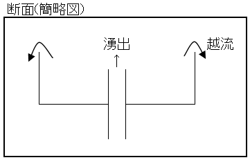 zylindrisches Wasserverteilbecken (Entō Bunsui), Japan